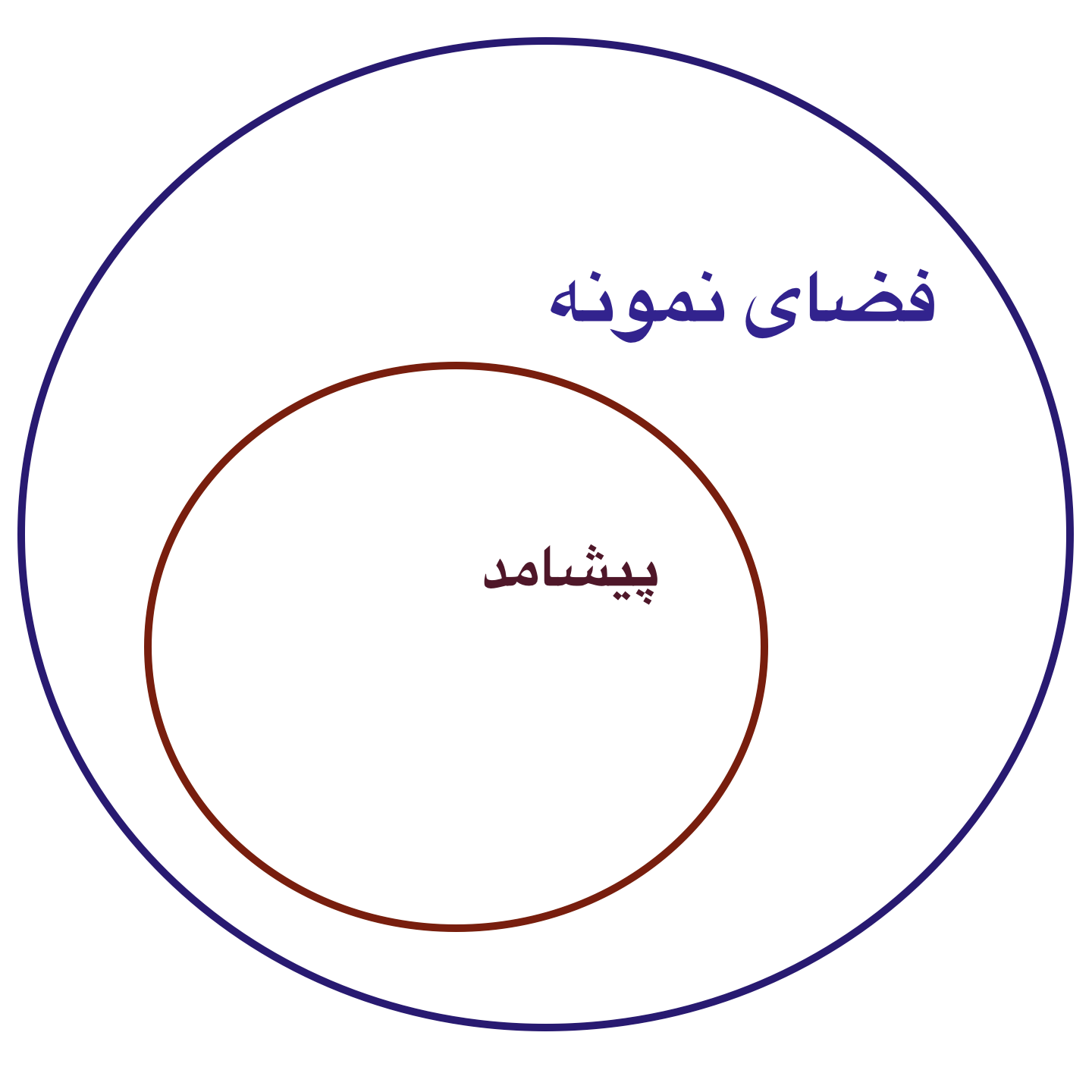 نمودار ون زیرمجموعه بودن پیشامد